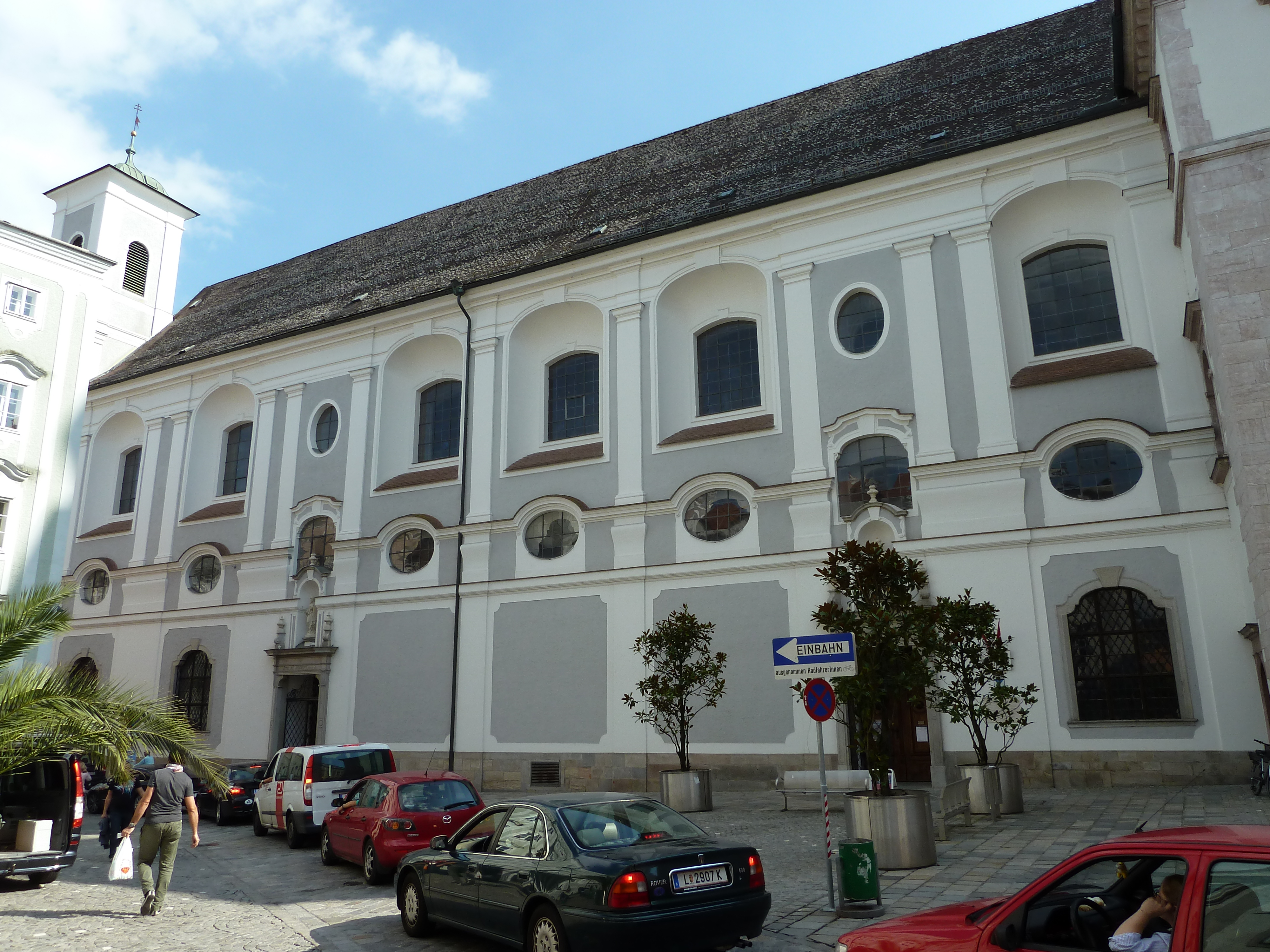 Ehem. Minoritenkirche Verkündigung Mariä, Landhauskirche